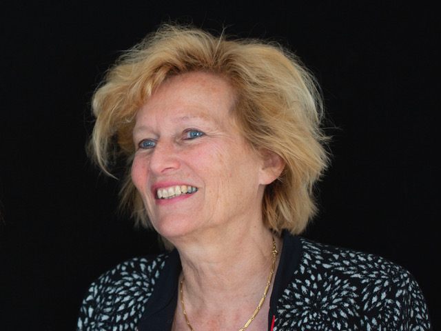 Sachbuchautorin, Kulturwissenschaftlerin und Journalistin Ina Boesch.